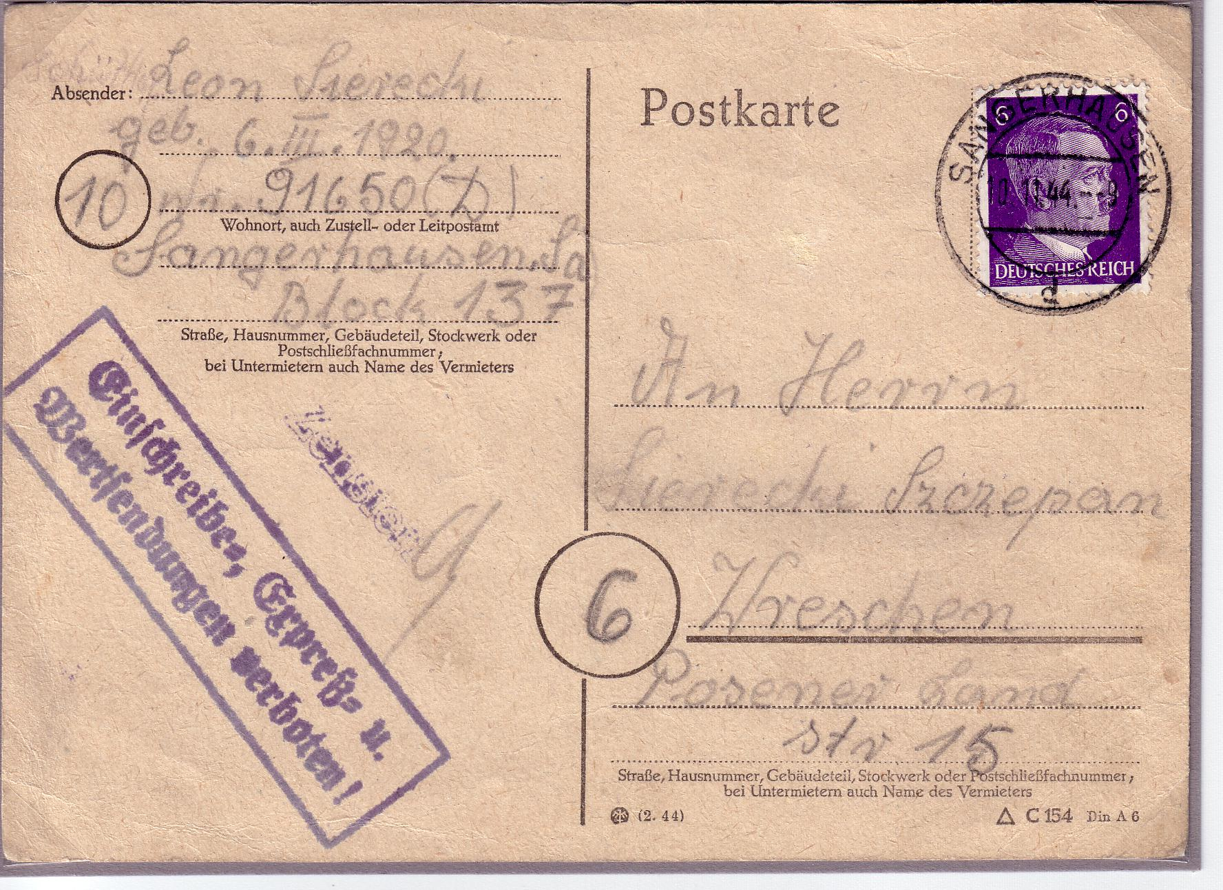 Postkarte eines Häftlings aus dem KZ Mittelbau-Dora von 1944 Poststempel: Sangerhausen, 10.11.1944 Gummistempel: Einschreibe-, Expreß- und Wertsendungen verboten!